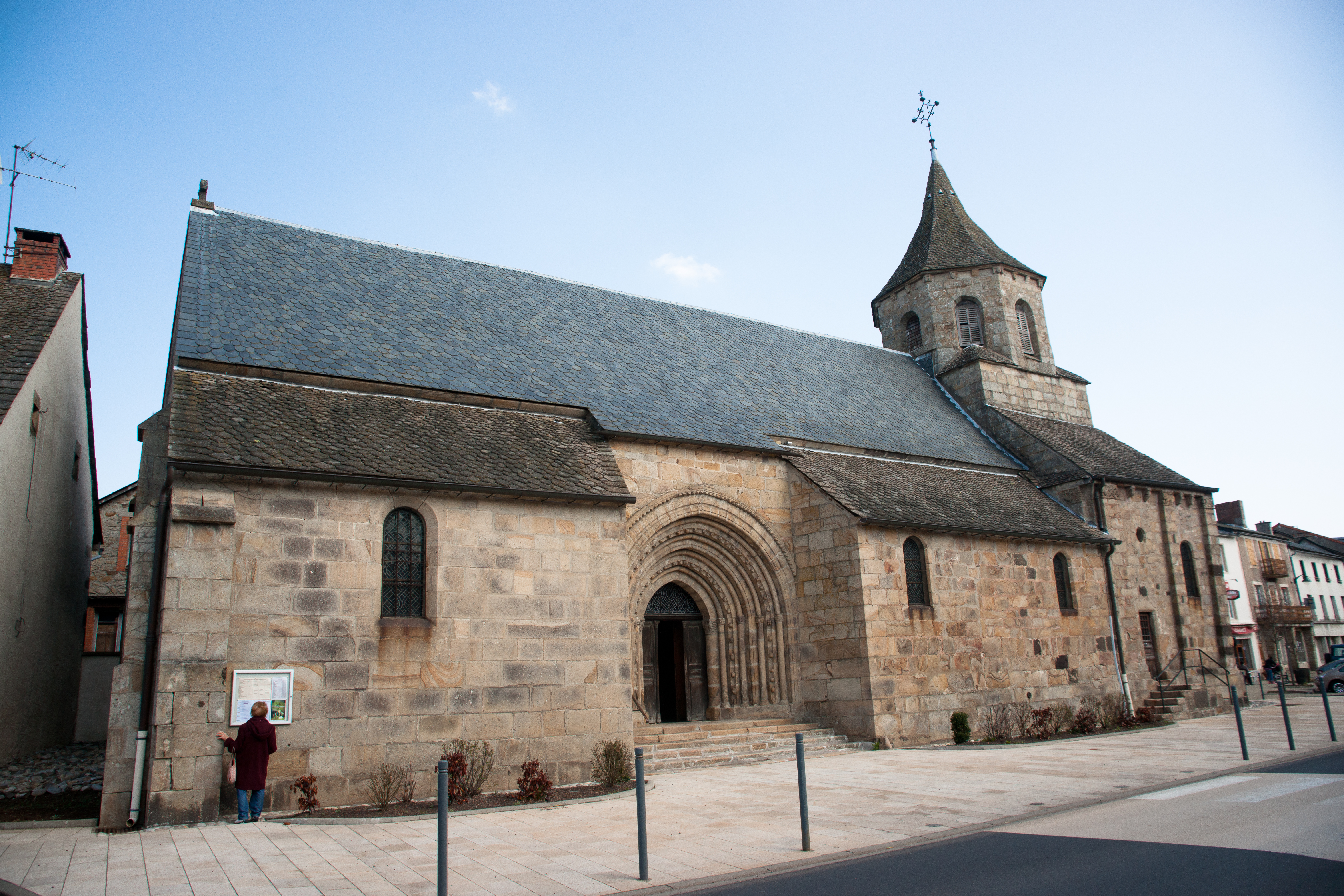 Église Saint-Fargheon de Bourg-Lastic